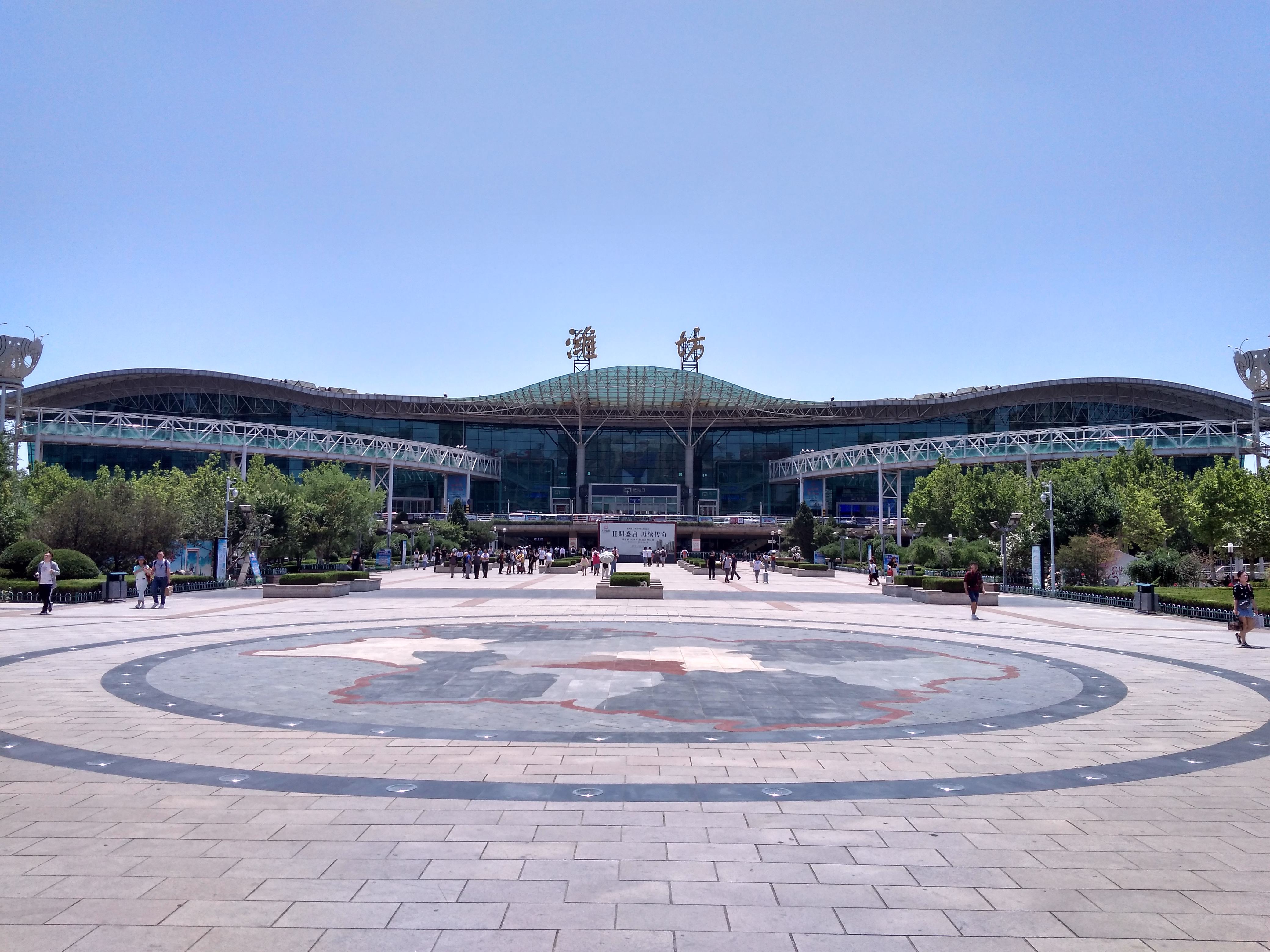 潍坊站，摄于2019年6月7日